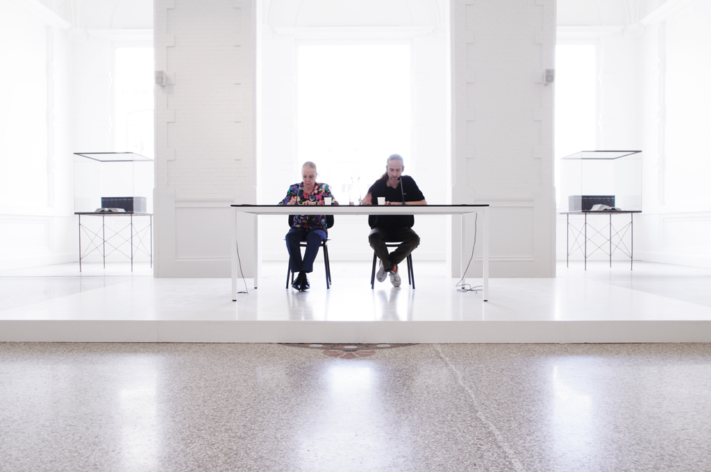 ผู้เข้าชมผลงาน One Million Years จะนั่งข้างกันและเริ่มอ่านปีในหนังสือไปพร้อมๆกัน